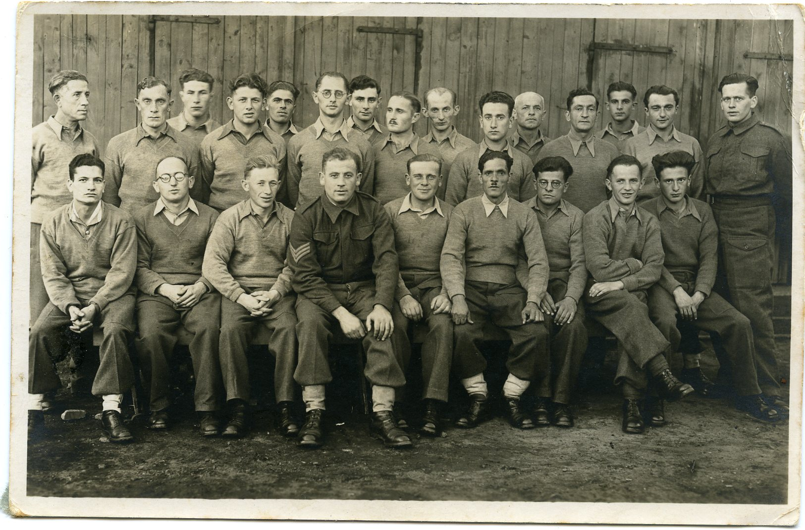 קבוצת חפרים שבויי מלחמה במחנה שבויים בגרמניה עם מנהגם יוסף אלמוגי (במרכז התמונה)